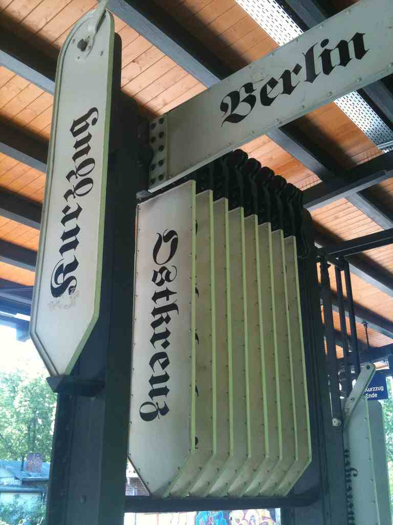 S-Wilhelmshagen